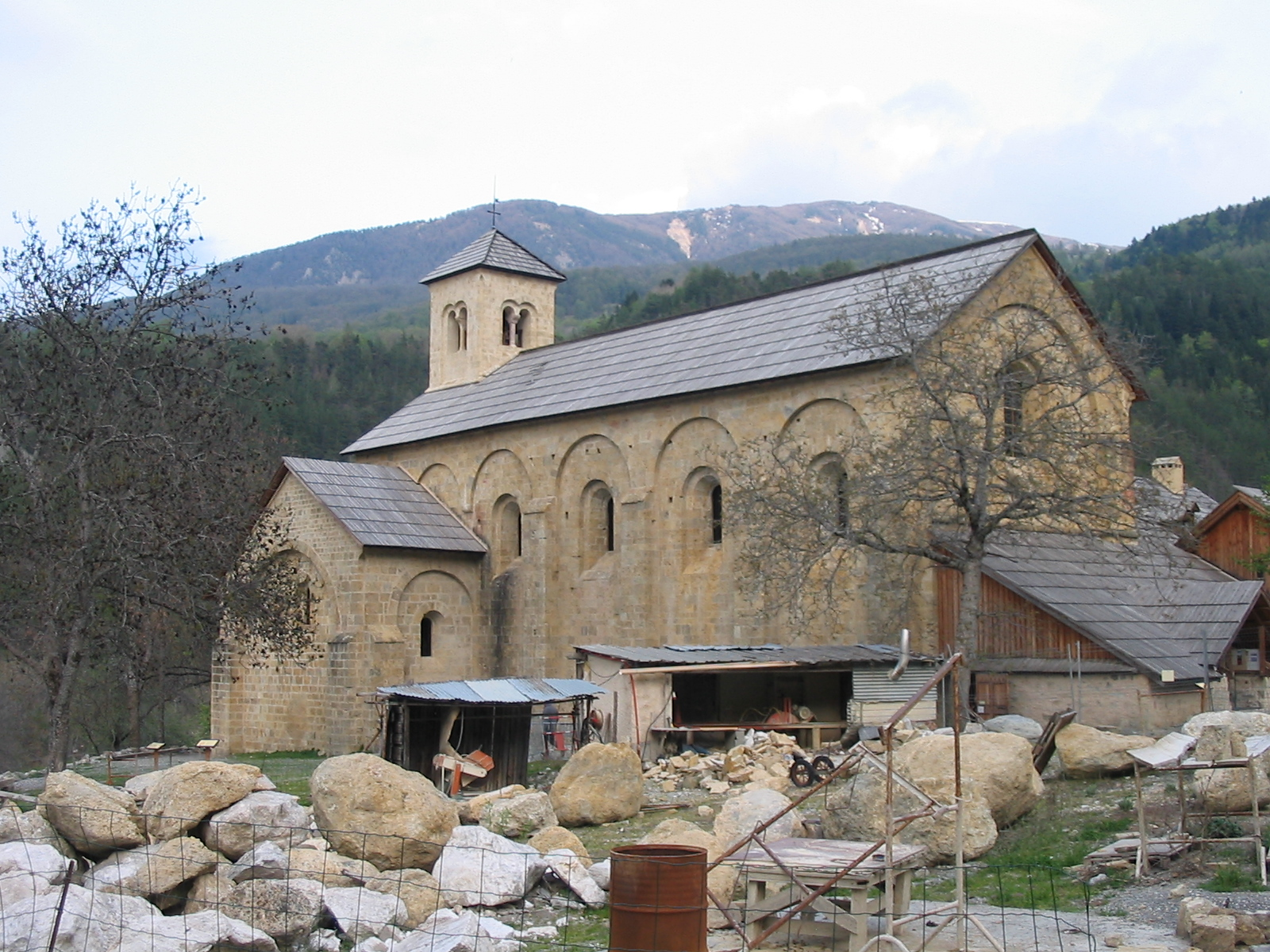 Abbaye de Boscodon (05) sur les hauteurs du lac de Serre-Ponçon. Vue générale. Je suis l'auteur du cliché pris en avril 2007.